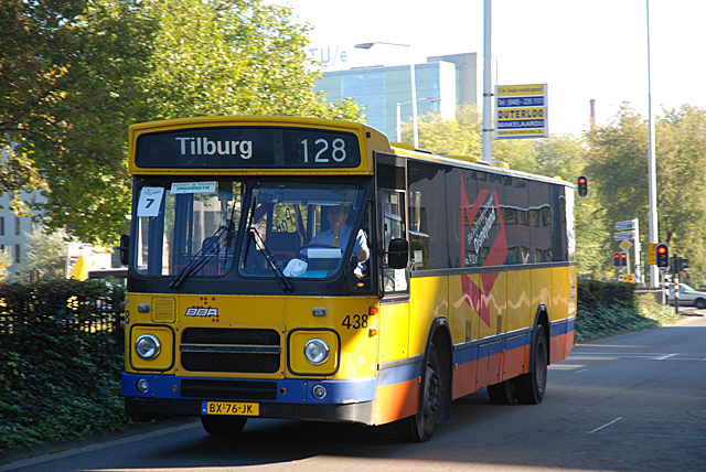 MB200 438 van BBA op lijn 128 Eindhoven - Tilburg te Eindhoven Station.